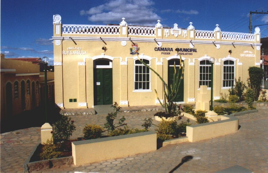 Prédio da Câmara Municipal de Caetité